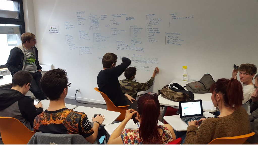 Escape game au Learning Lab de l'IUT de Béziers